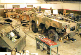 Vehículo Anfibio Para de Exploración (VAPE 2, Panhard) en el taller de TENSA